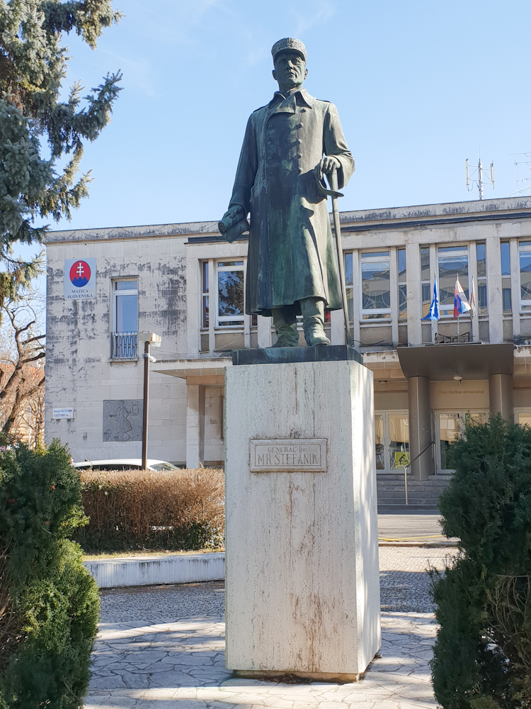 Statue_of_General_Dr_M_R_Stefanik_in_Komárnolabel QS:Len,"Statue_of_General_Dr_M_R_Stefanik_in_Komárno"label QS:Lhu,"Stefanik tábornok szobra Komarnóban"